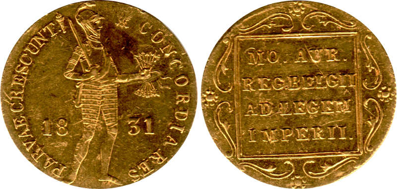 Dukat 1831 kropka przed pochodnia